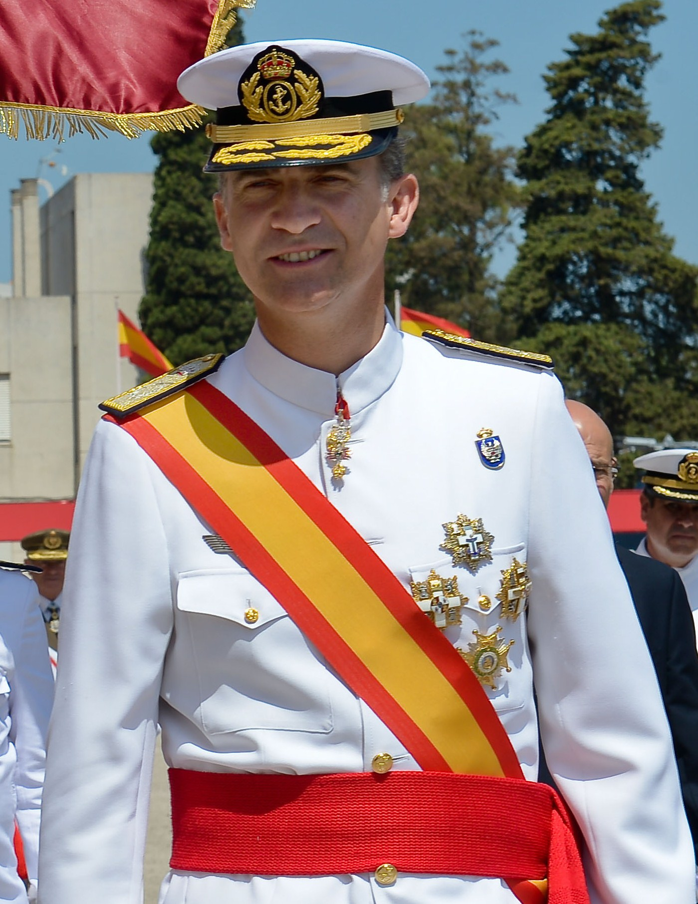 14.07.11-Escuela Marina-7-San Fernando